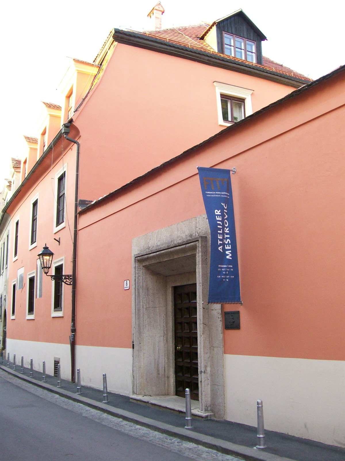 Atelijer Meštrović Zagreb